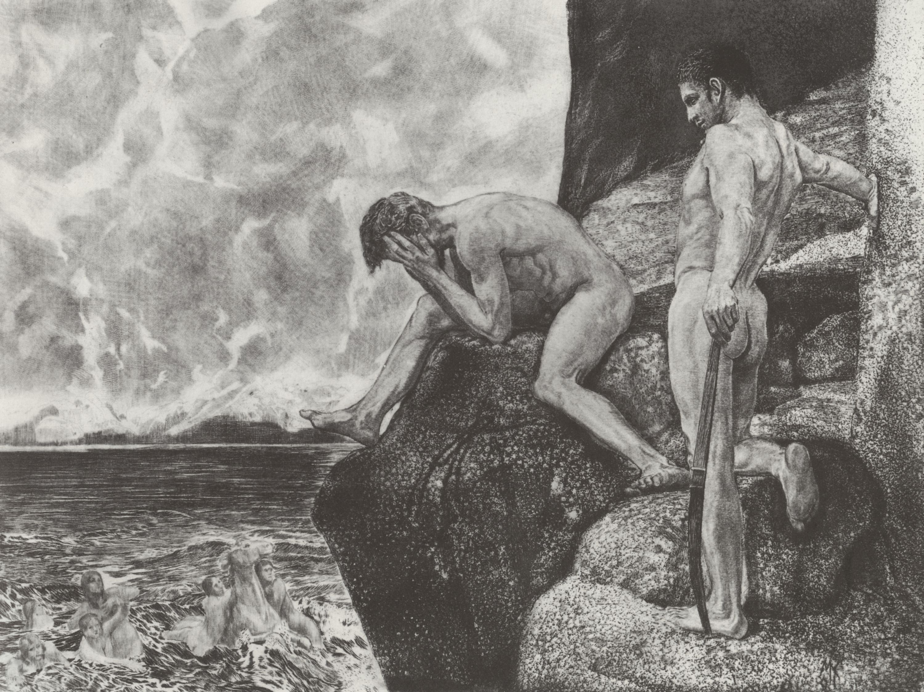 Max Klinger: Der befreite Prometheus, 1888–1894. Siehe auch Bruno Franks Gedicht „Der Befreite“, 1905.